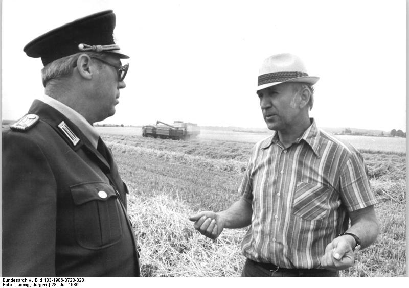 Großobringen, Ernte, Kontrolle durch Feuerwehr ADN-ZB Ludwig-28.7.86-St. Bez. Erfurt: Brandschutzmaßnahmen bei der Getreidernte- Seit 24 Jahren kontrolliert der Abschnittsbevollmächtigte, Leutnant Hans Ritter (l.), während der Erntearbeiten die notwendigen Maßnahmen des Brandschutzes und der Betriebssicherheit von Ernte- und Transporttechnik. Hier im Gespräch mit Komplexleiter Rudolf Preuß vom VE (P) Großobringen im Kreis Weimar Land. Die Landarbeiter des Volksgutes haben von rund 3 100 Hektar Getreide zu ernten, Stroh zu bergen und die erforderlichen Maehfolgearbeiten auszuführen. ( Siehe Foto 1986-0728-22 N)